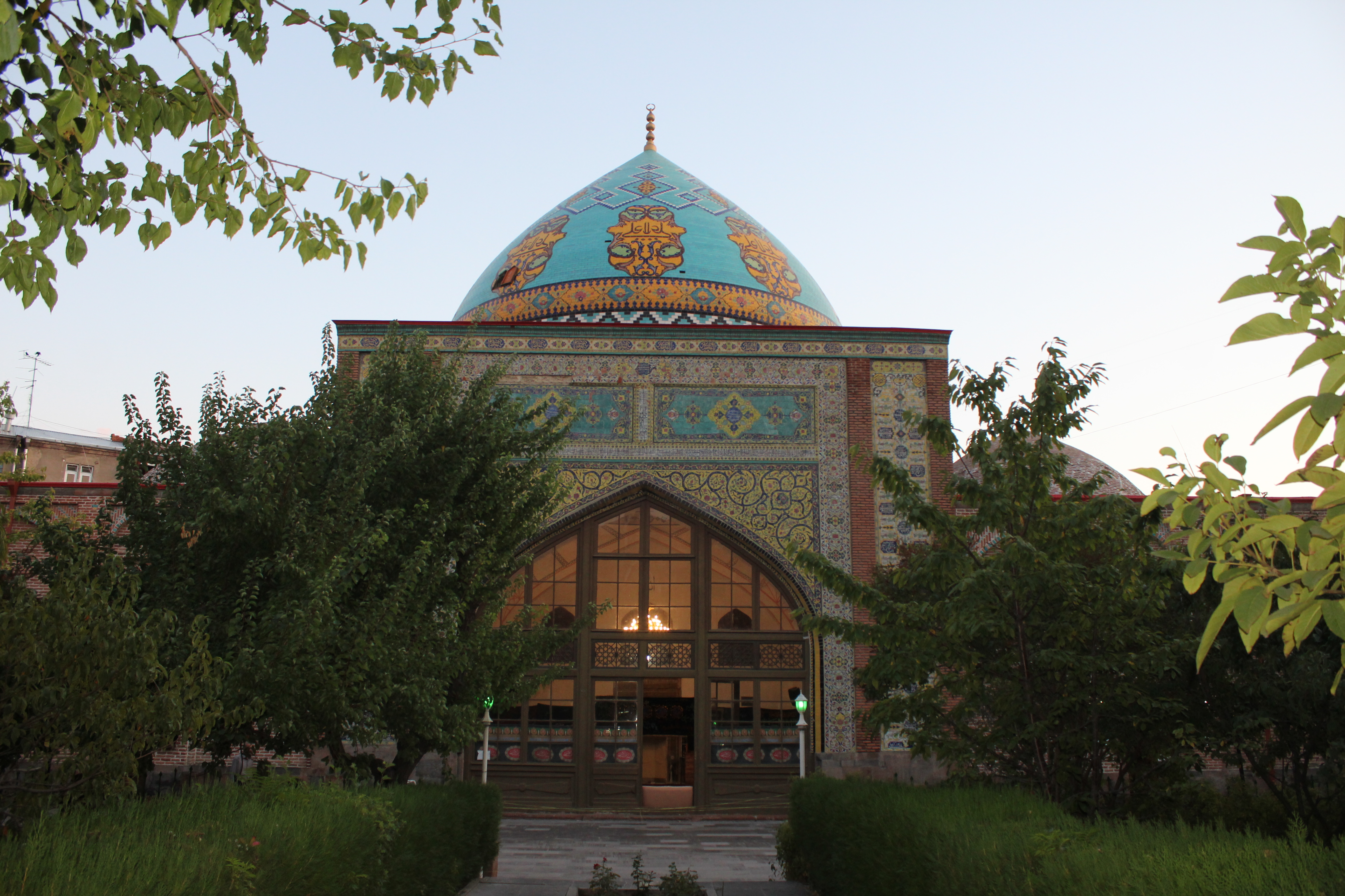 Պարսկական Կապույտ մզկիթը Երևանում 6/150